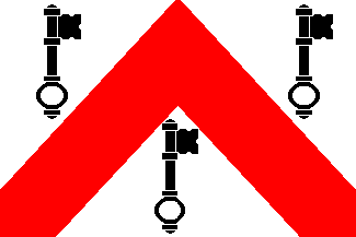 Vlag van Tielt